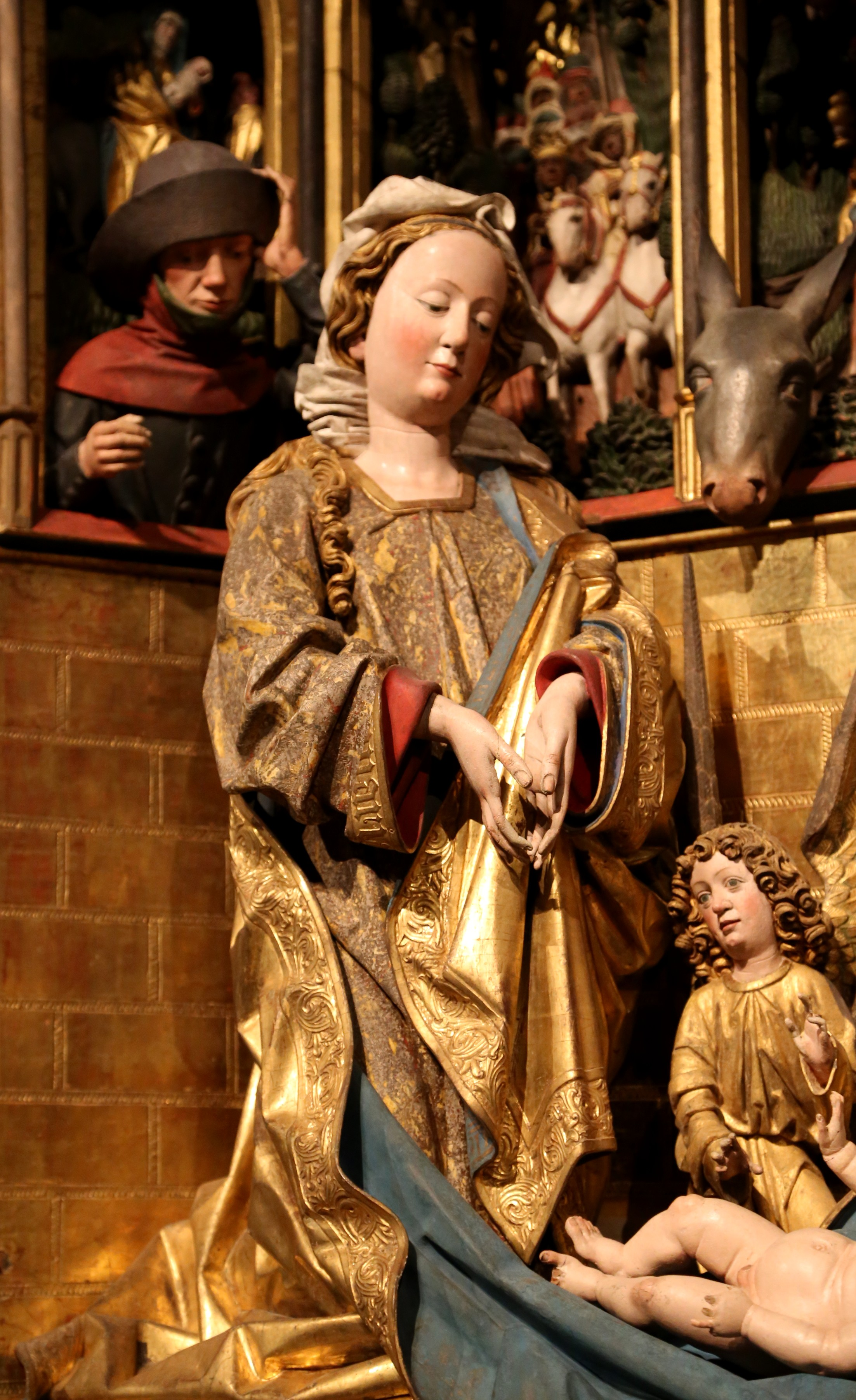 Hans Klocker und Werkstatt: Traminer Altar, Brixen, um 1485/90, Zirbel- und Fichtenholz mit originaler Fassung, Bayerisches Nationalmuseum in München